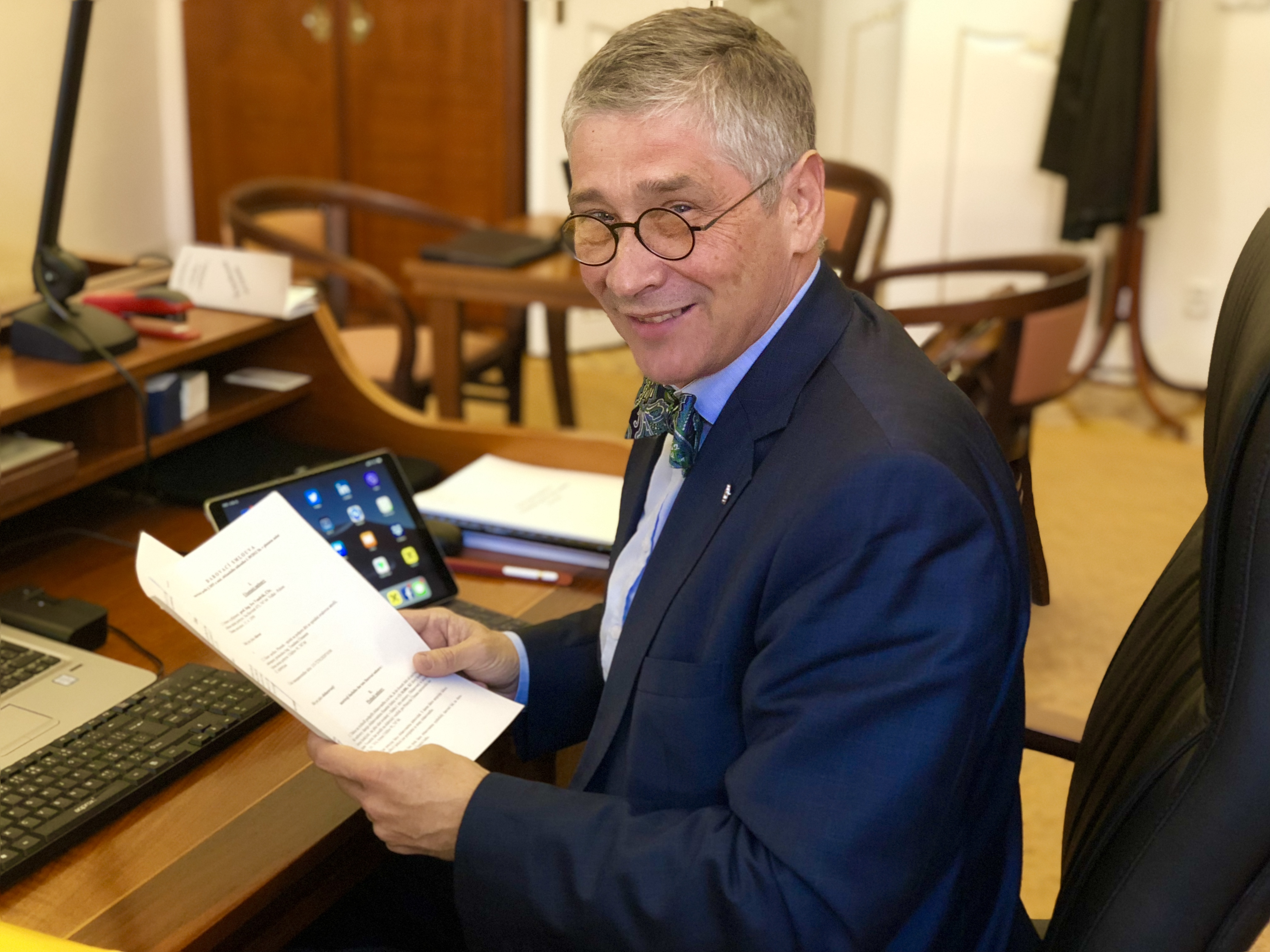 Ivo Vondrák v poslanecké kanceláři v Praze